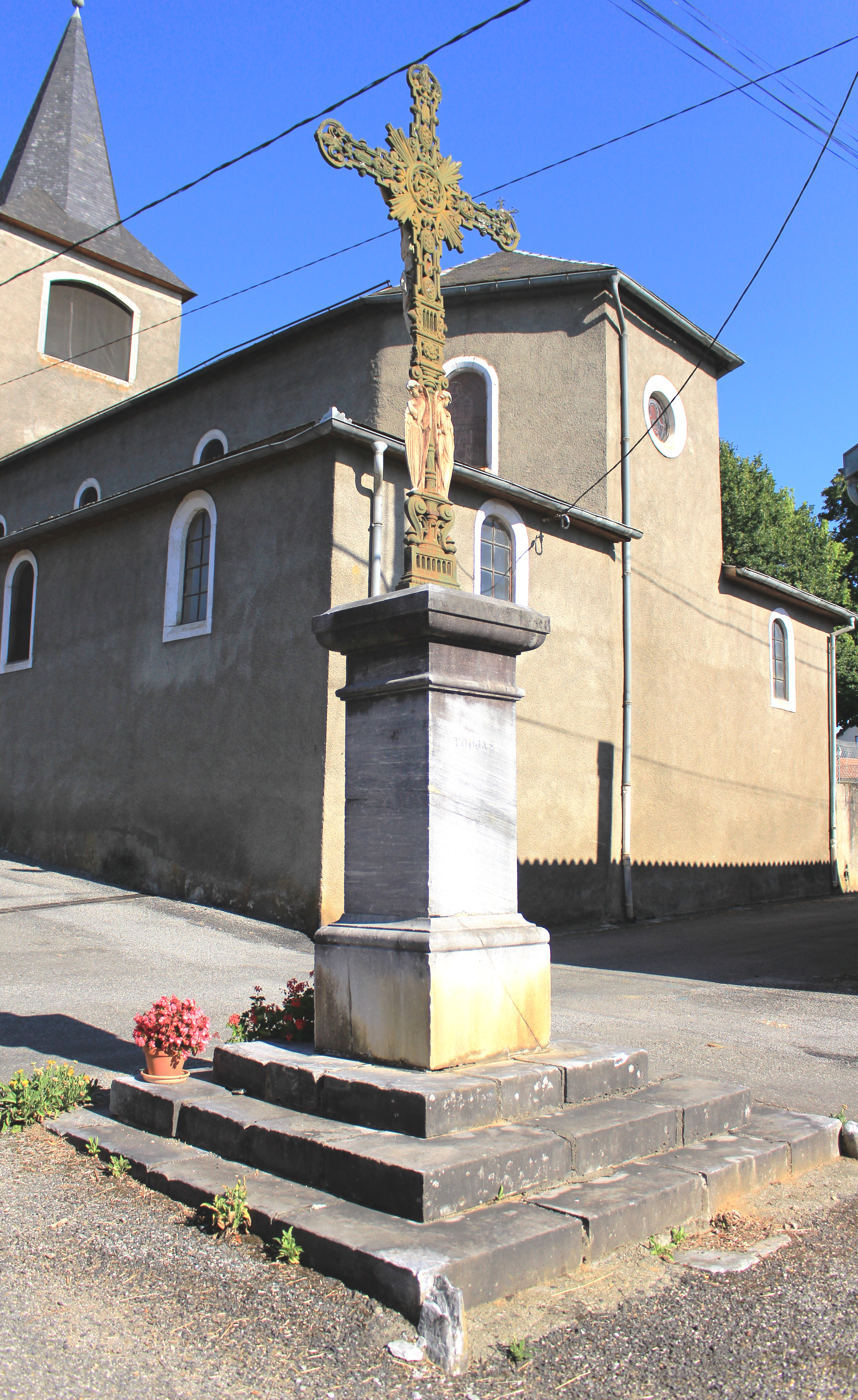 Croix de Campistrous (Hautes-Pyrénées)